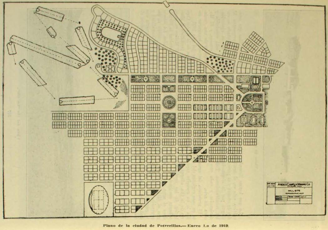 Plano de Potrerillos antigua localidad minera de la región de Atacama en Chile, se ubica en la Precordillera de Los Andes a unos 2800 metros sobre el nivel del mar.